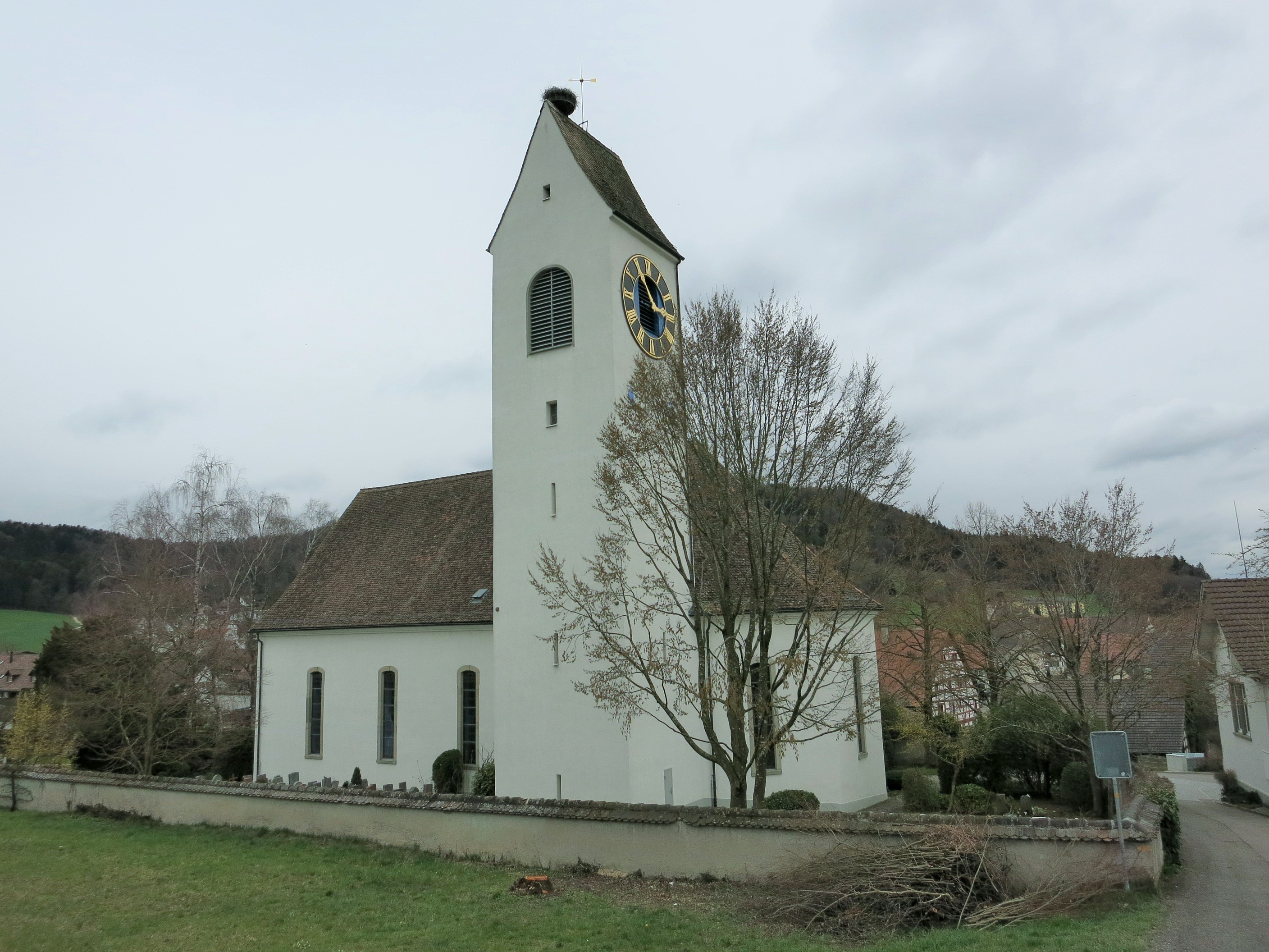 Kirche, Stadel bei Niederglatt ZH, Schweiz